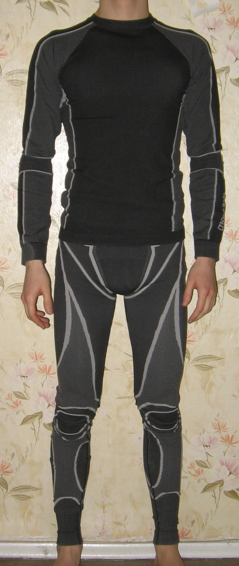 Термобельё